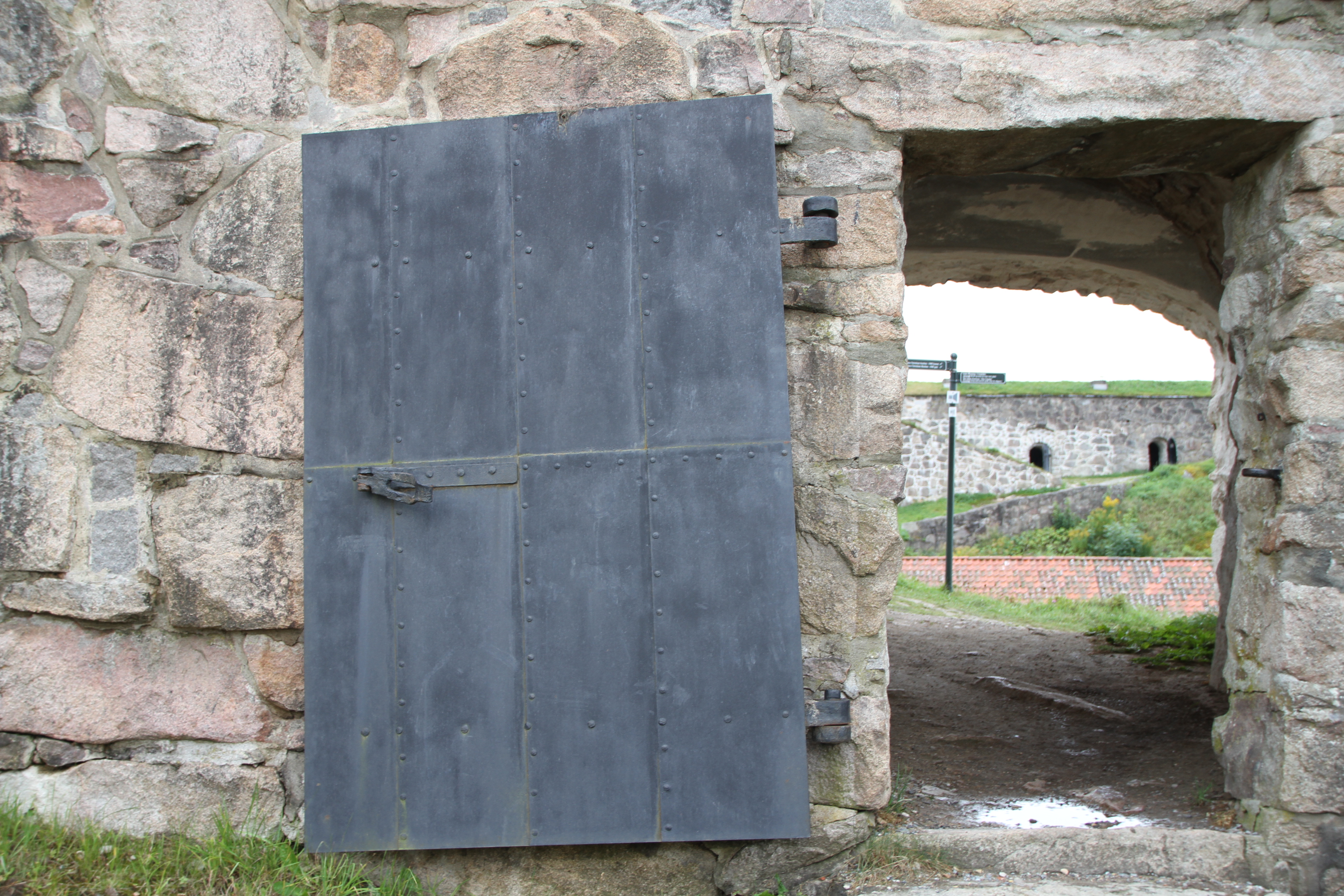 Northern curtine of the Fredriksten fortress, Halden (Norway)